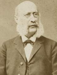 Ludwig Herzfeld (1819-1911), Jurist und Ehrenbürger in Halle (Saale)